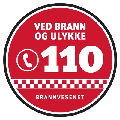 Ved brann og ulykke ring 110